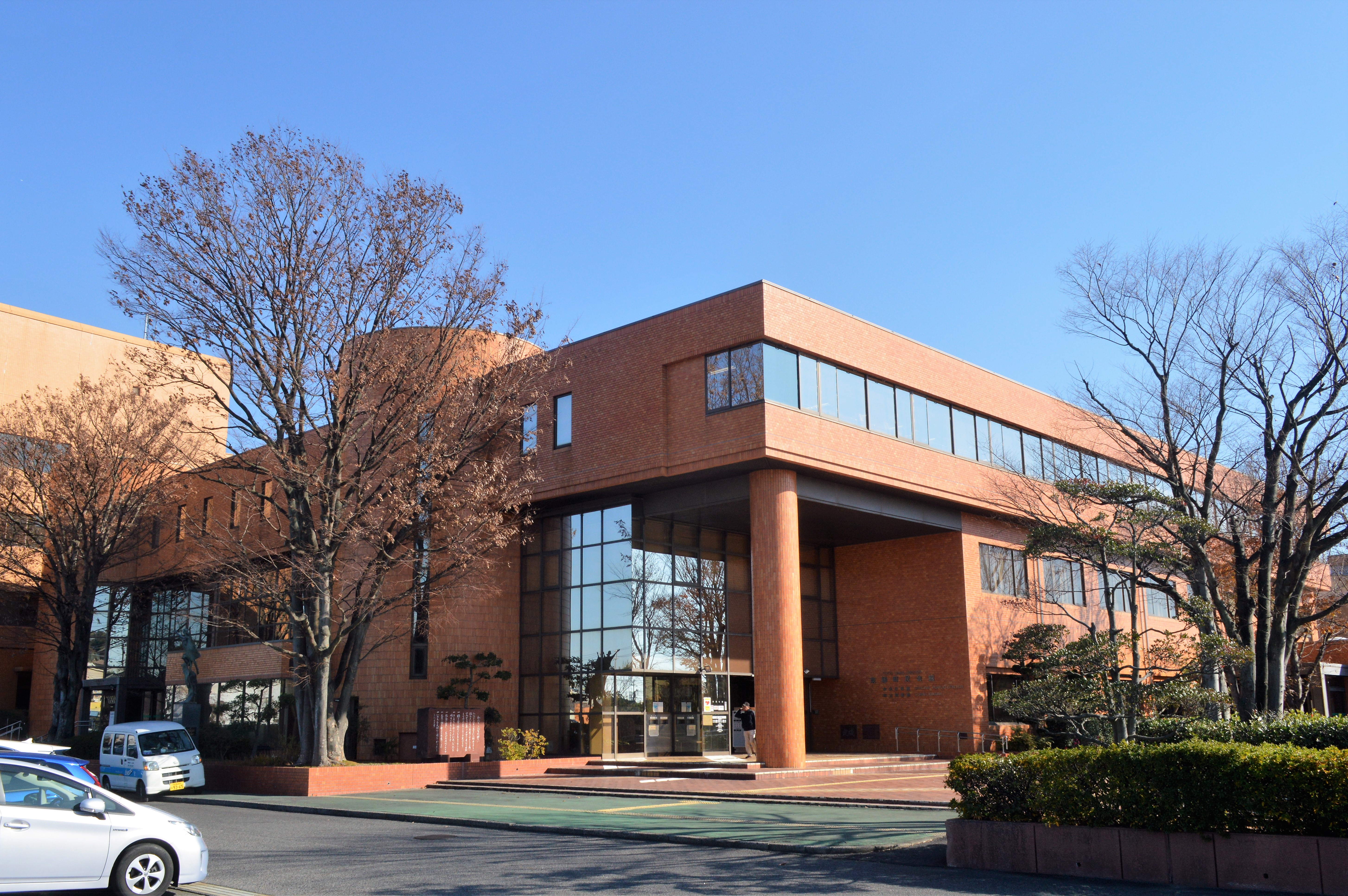 愛知県愛知郡東郷町の東郷町民会館。東郷町立図書館や東郷町中央公民館が入っている。